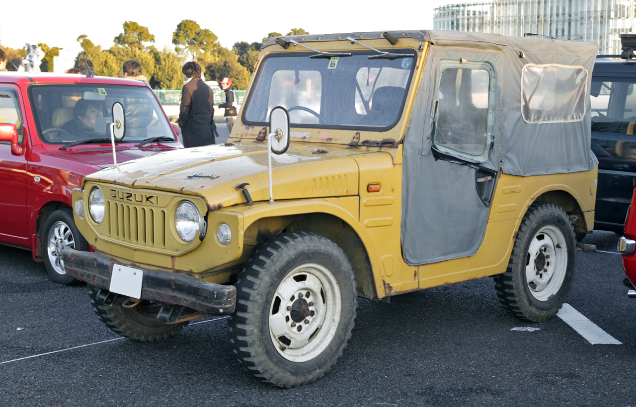 Suzuki Jimny 360 Water cooled ( LJ20-1 )